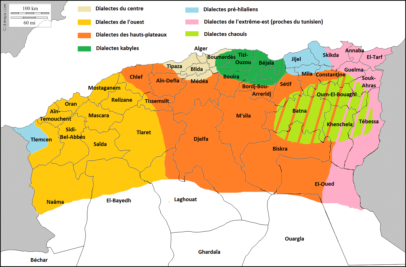 dialectes en Algérie.